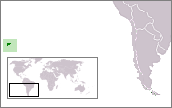 Fotografía hecha por el autor